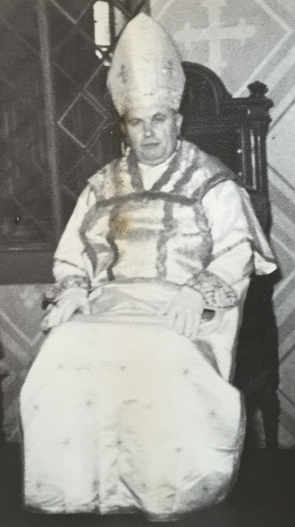 Liberecký arciděkan František Klapuch někdy mezi lety 1957-1964